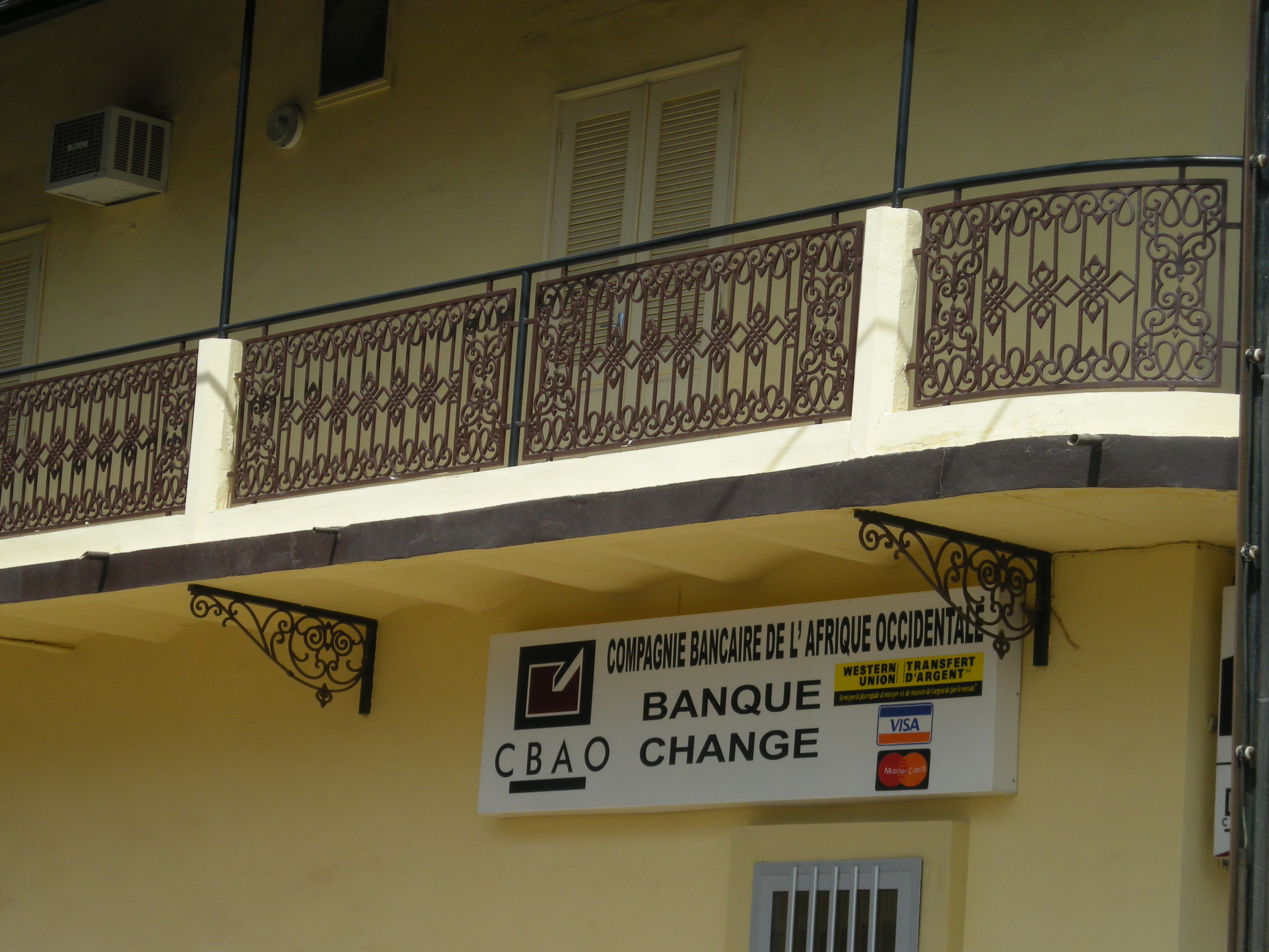 Une agence de la CBAO (Compagnie bancaire de l'Afrique occidentale), dans une maison coloniale de Ziguinchor (Casamance, sénégal)